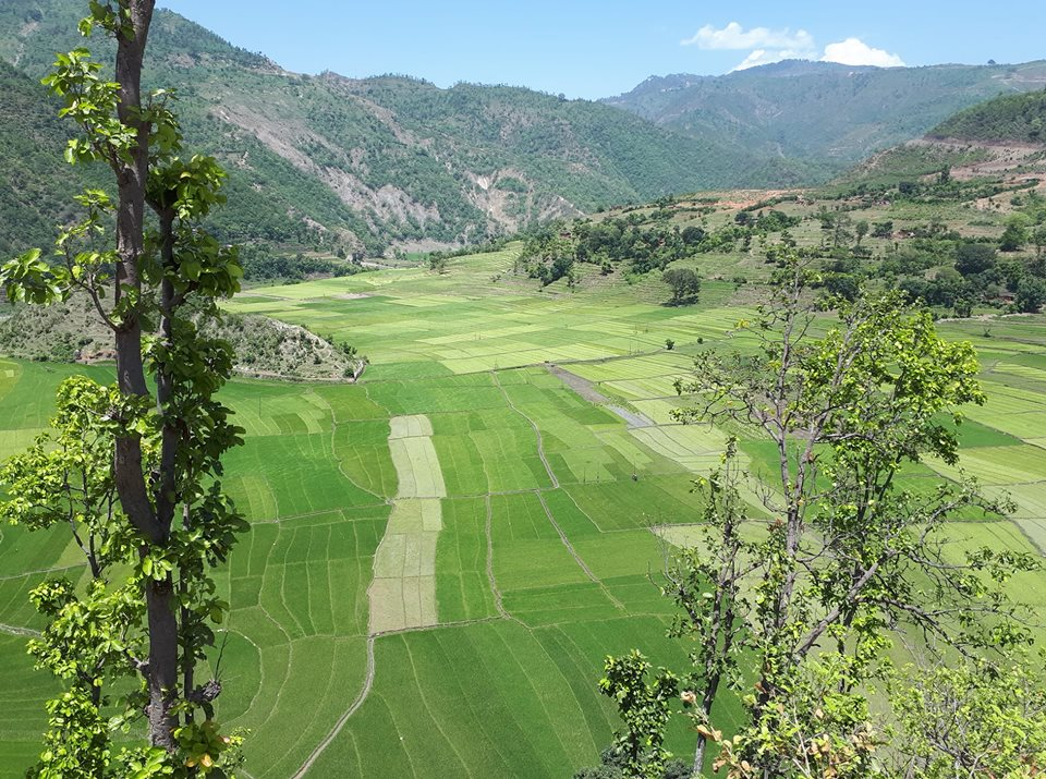 नेपाली: Dadeldhuraa ko Radil khet